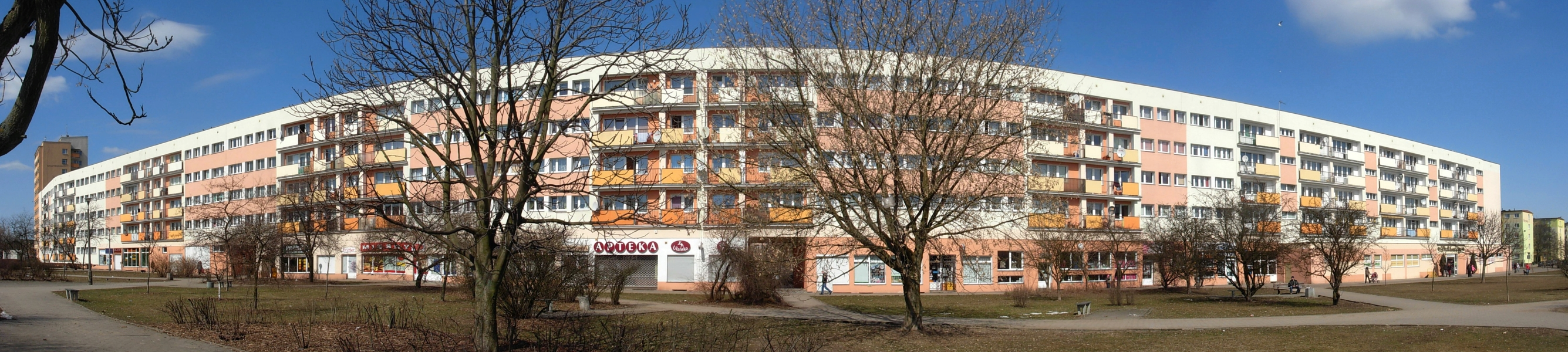 Zabudowa (falowiec) przy skwerze 16 Pułku Ułanów Wlkp na osiedlu Błonie w Bydgoszczy